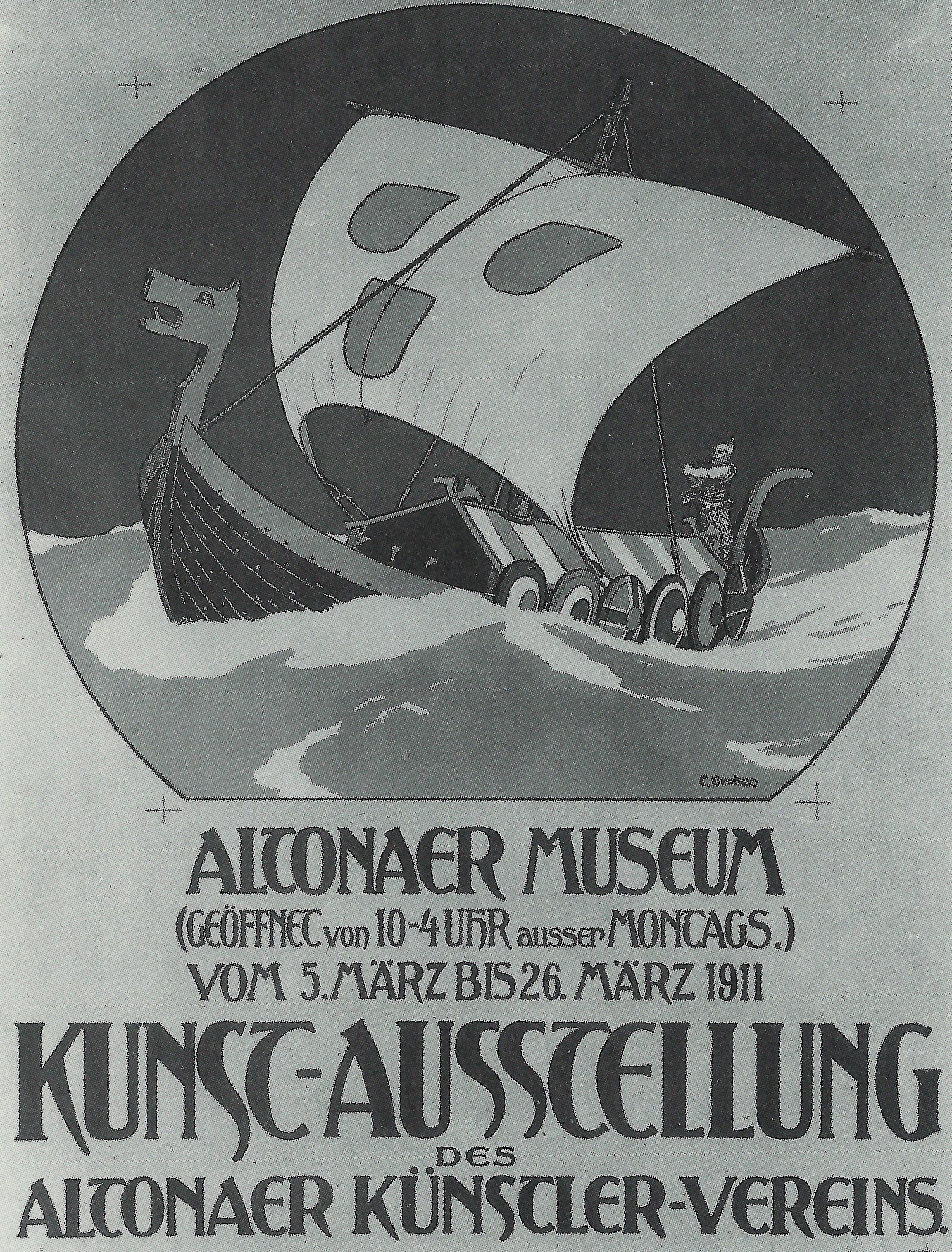 Schwarz-weiß-Abbildung eines Ausstellungsplakts des Altonaer Künstlervereins, 1911. Entwurf von Carl Becker, Lithografie, 58,5 × 43 cm. Altonaer Museum, Inv. Nr.: AB 8212